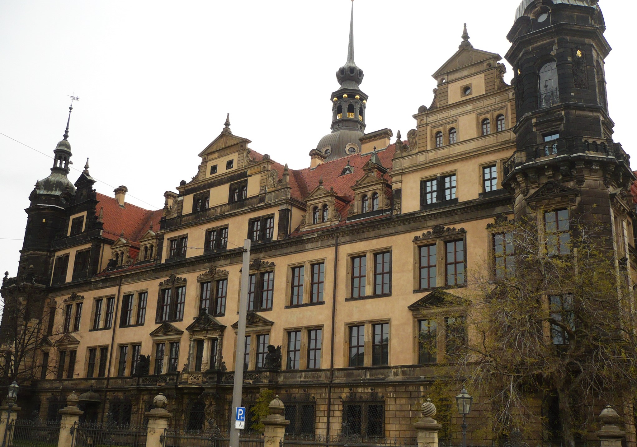 Drezno. Zamek